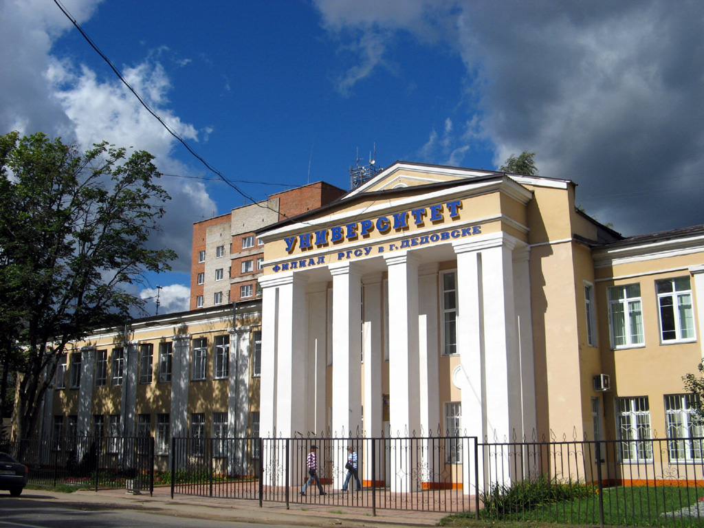 Филиал Российского государственного социального университета в Дедовске